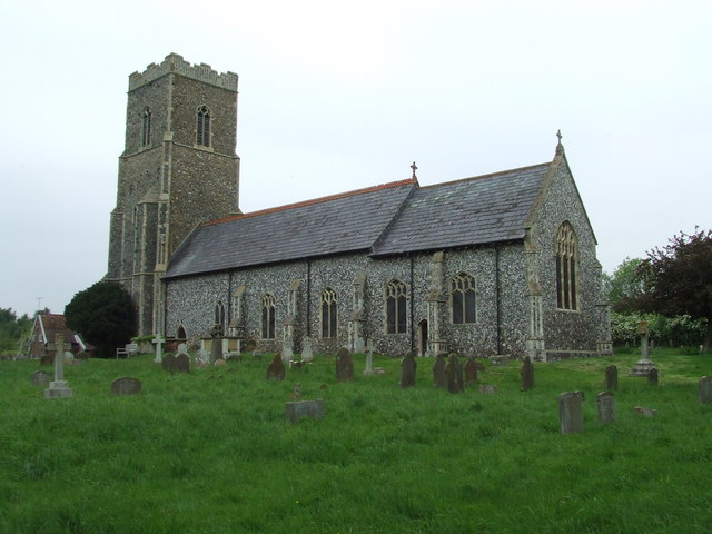 All Saints Hollesley